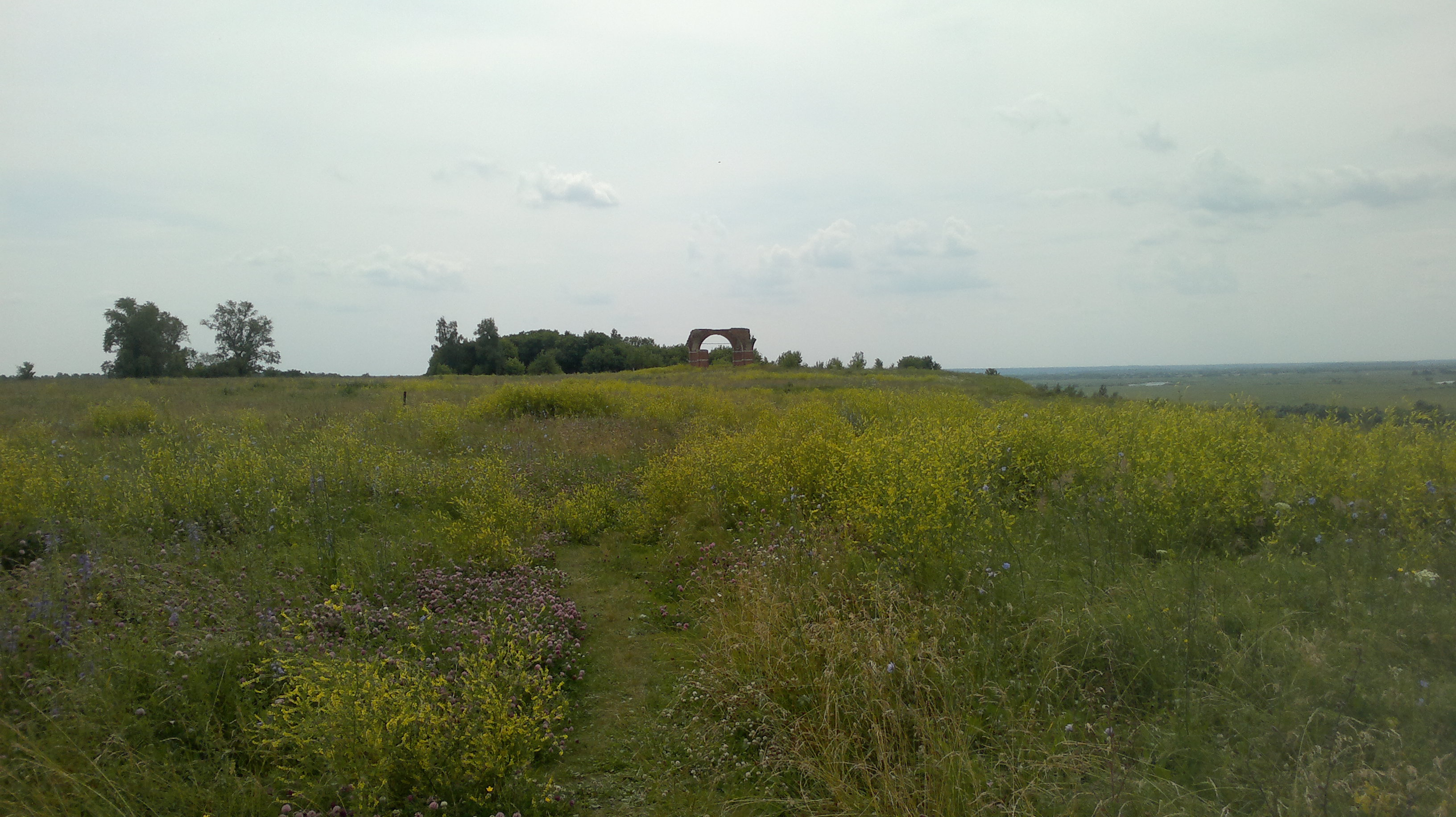 Городище "Старая Рязань" (детинец, посад, святилище древнерусского города Рязань): юго-восточнее села, Старая Рязань, Спасский район, Рязанская область